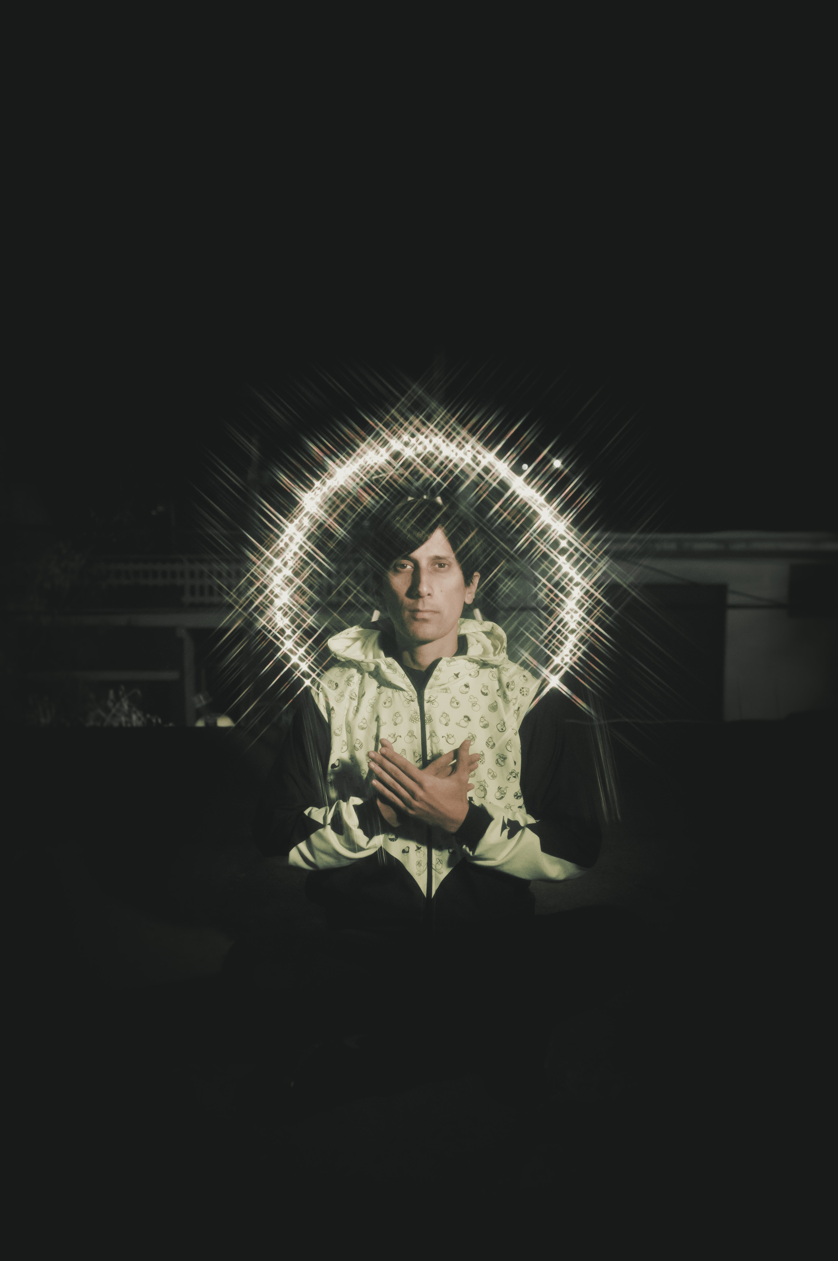 Foto x Rocío Frigerio